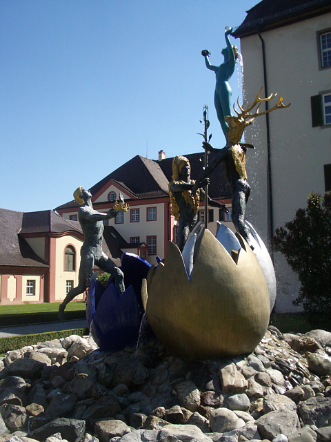 Altshausen, Germany: Schlosspark, "Geburt der Isis" (von Diane Herzogin von Württemberg, 1989/1990), im Hintergrund das Neue Schloss.